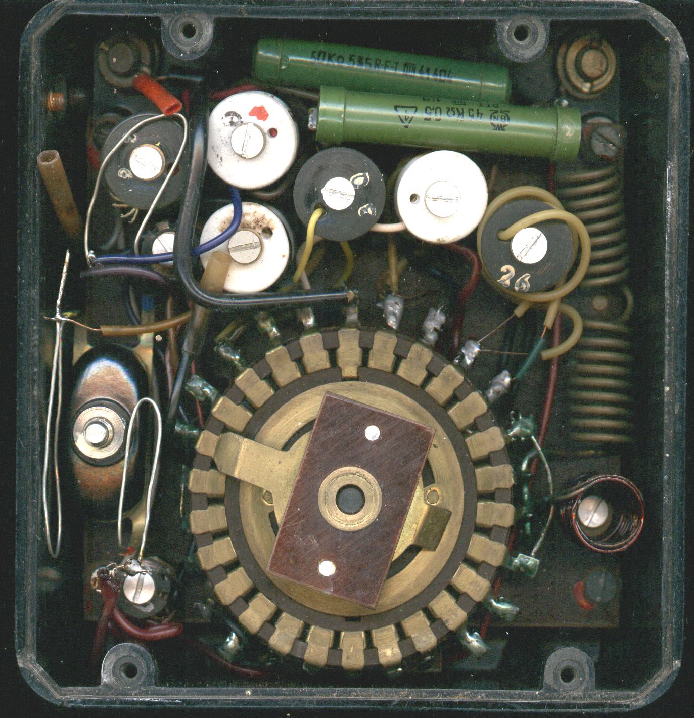 Vielfachmesser